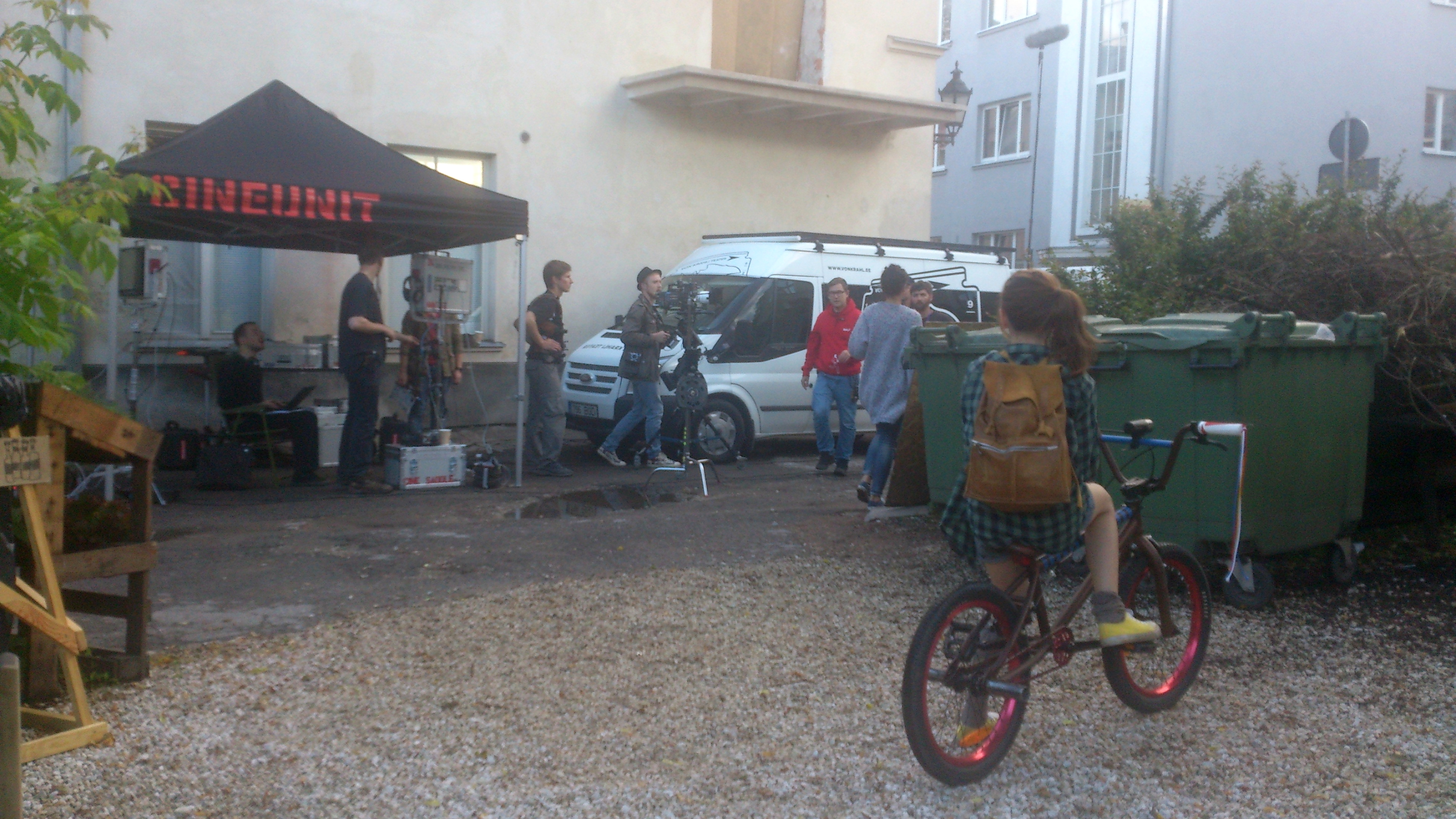 "Supilinna salaseltsi" filmivõtted Tartus Magasini tänaval, 29. juuni 2014